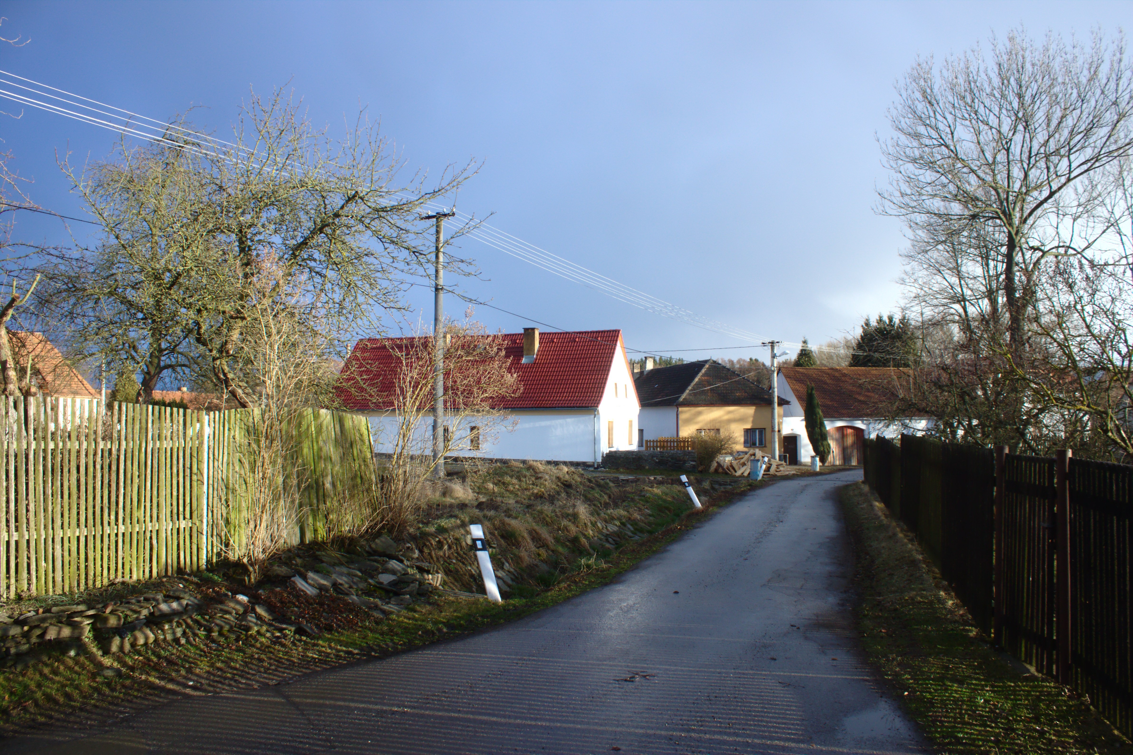 Domy ve vesnici Skřídla Project: Fotíme Česko